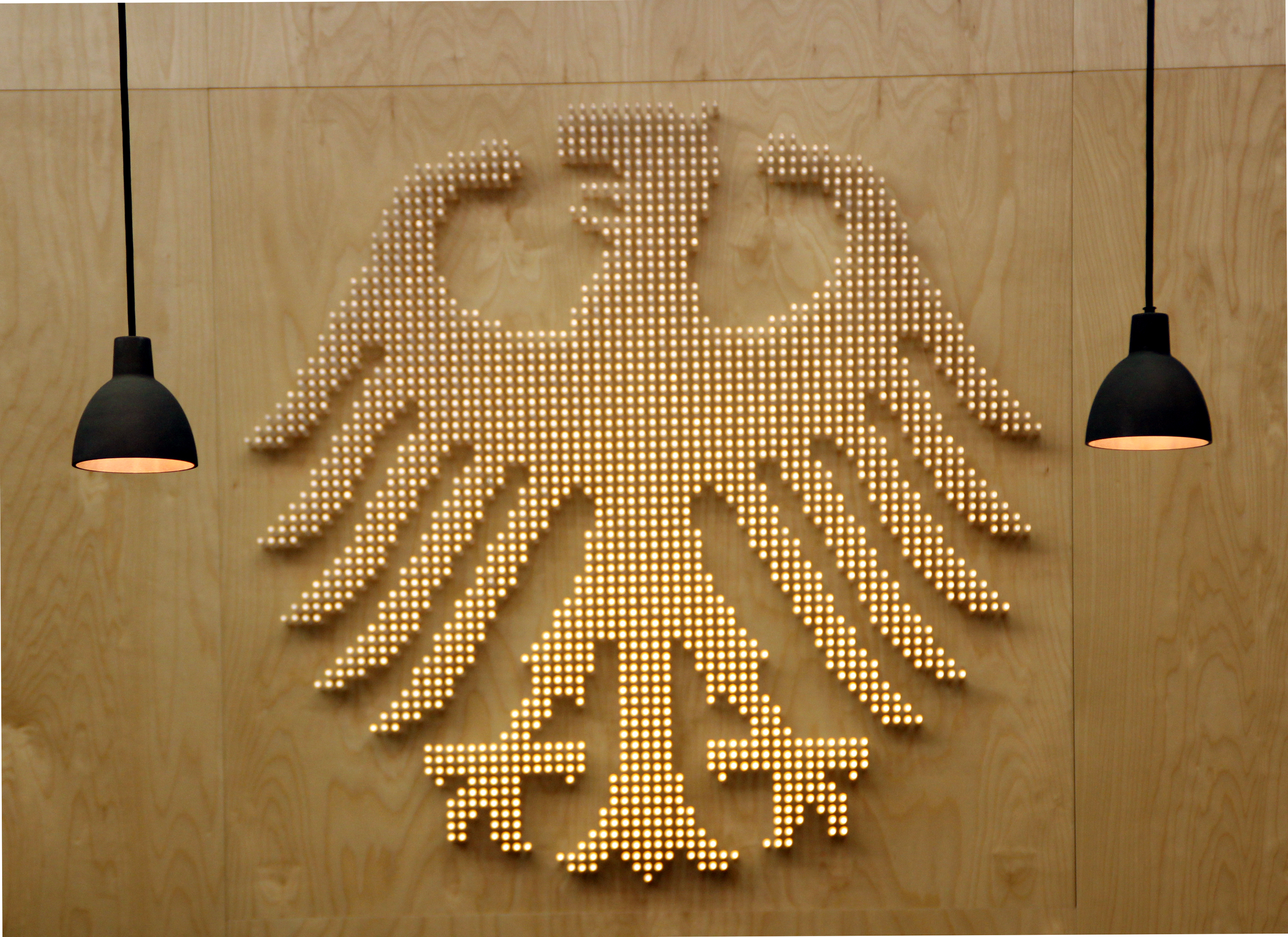 Der Bundesadler mit illuminierten LEDs. Exkursion von WikiCon-Teilnehmern zum Bundesverfassungsgericht, Dienstsitz Waldstadt.